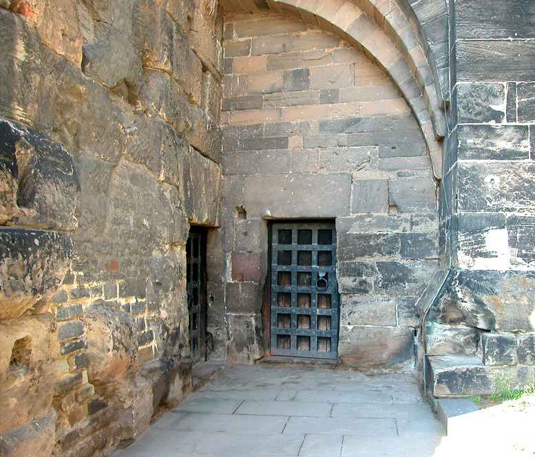 Porta Nigra, Kamera of St. Simeon. ru: Место затвора св. Симеона в римских воротах Порта Нигра (Трир)